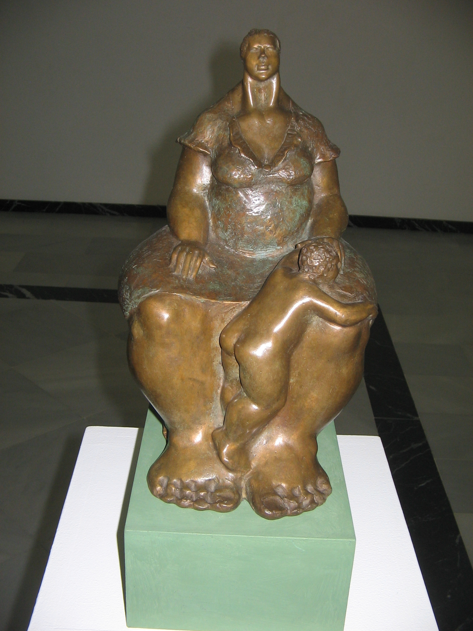 Maternidad. Escultura de Paco Luque